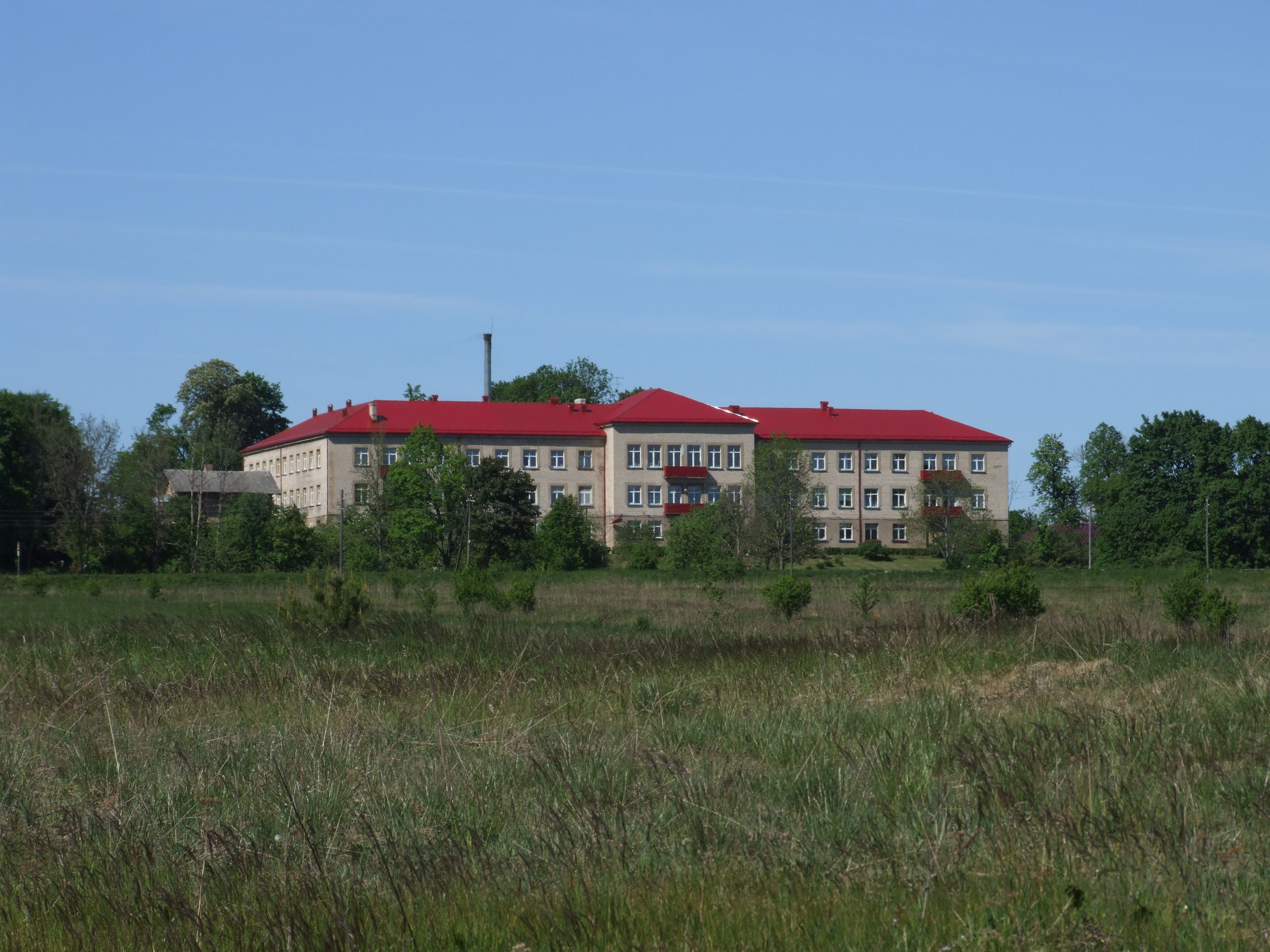 Veģu pansionāta ēka